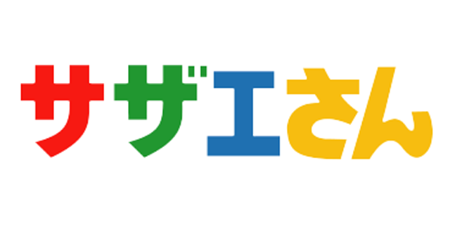 サザエさん